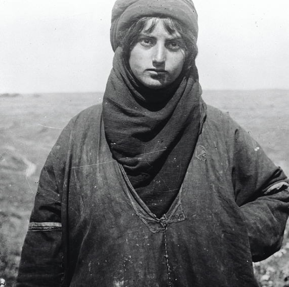 בדואית בבית-שאן